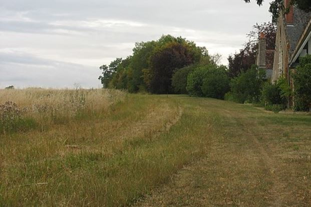 Champs et paysages naturels à Fondettes, à proximité des Pivottières.